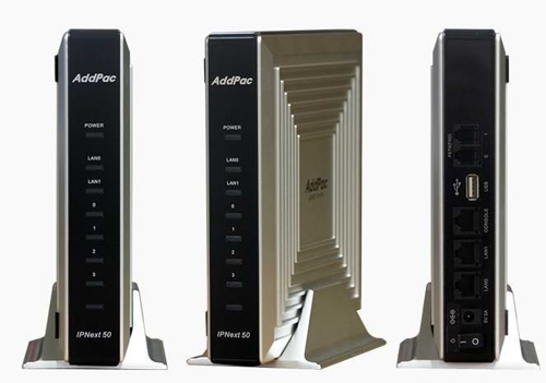 Офисная IP-PBX AddPac IPNext50 для малого бизнеса (10/20 абонентов)